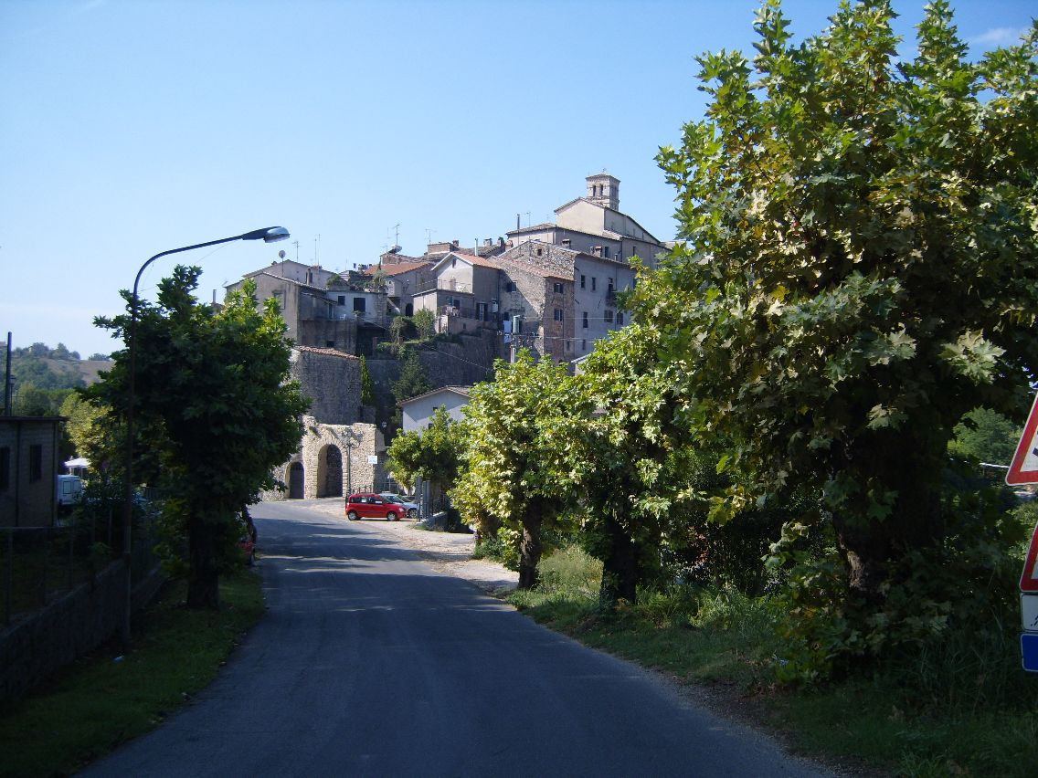 der Ort, in den ich durch die Waschküche kam